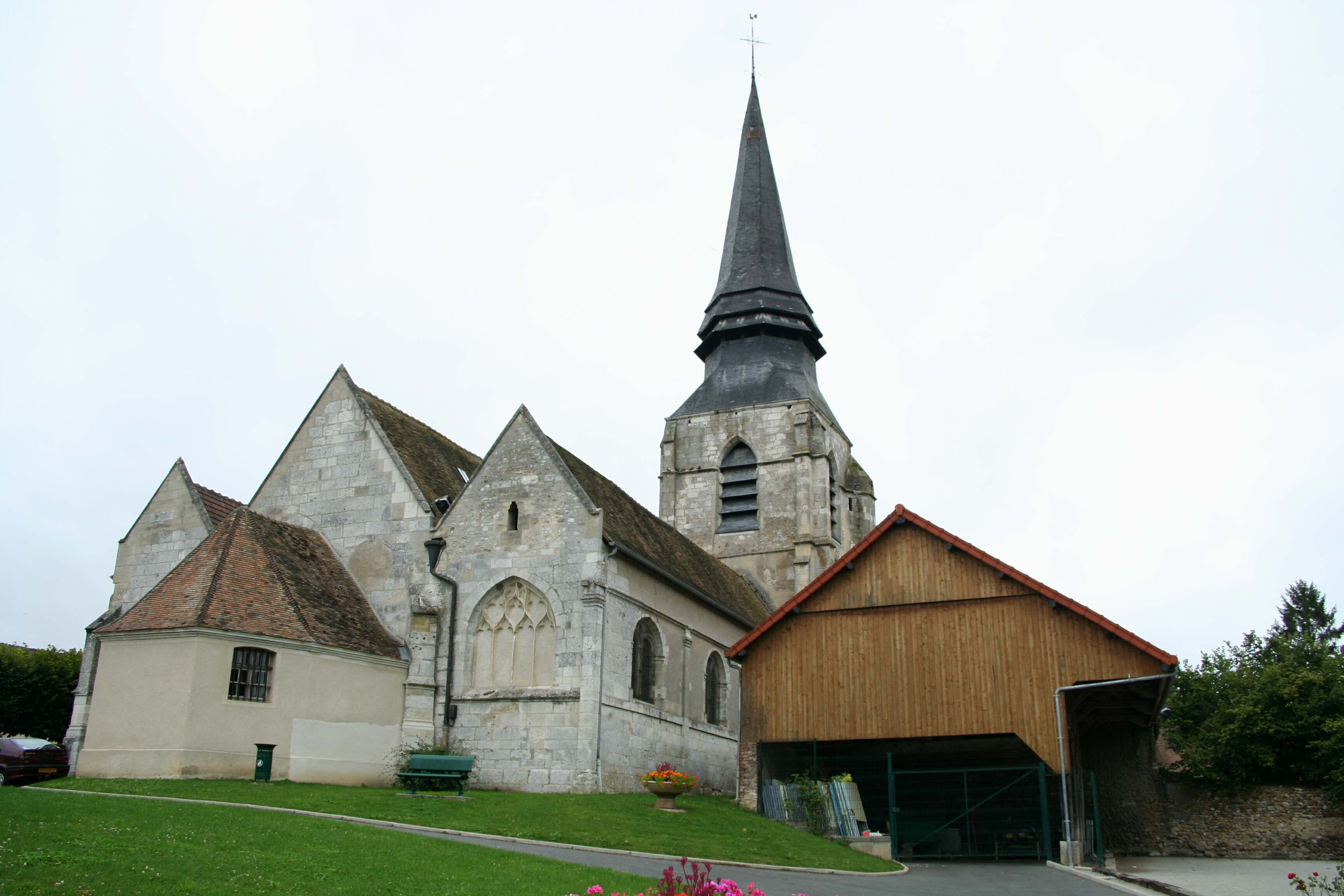 Église de Notre-Dame-de-Grâce de Saint-Pierre-de-Bailleul, Eure (France)